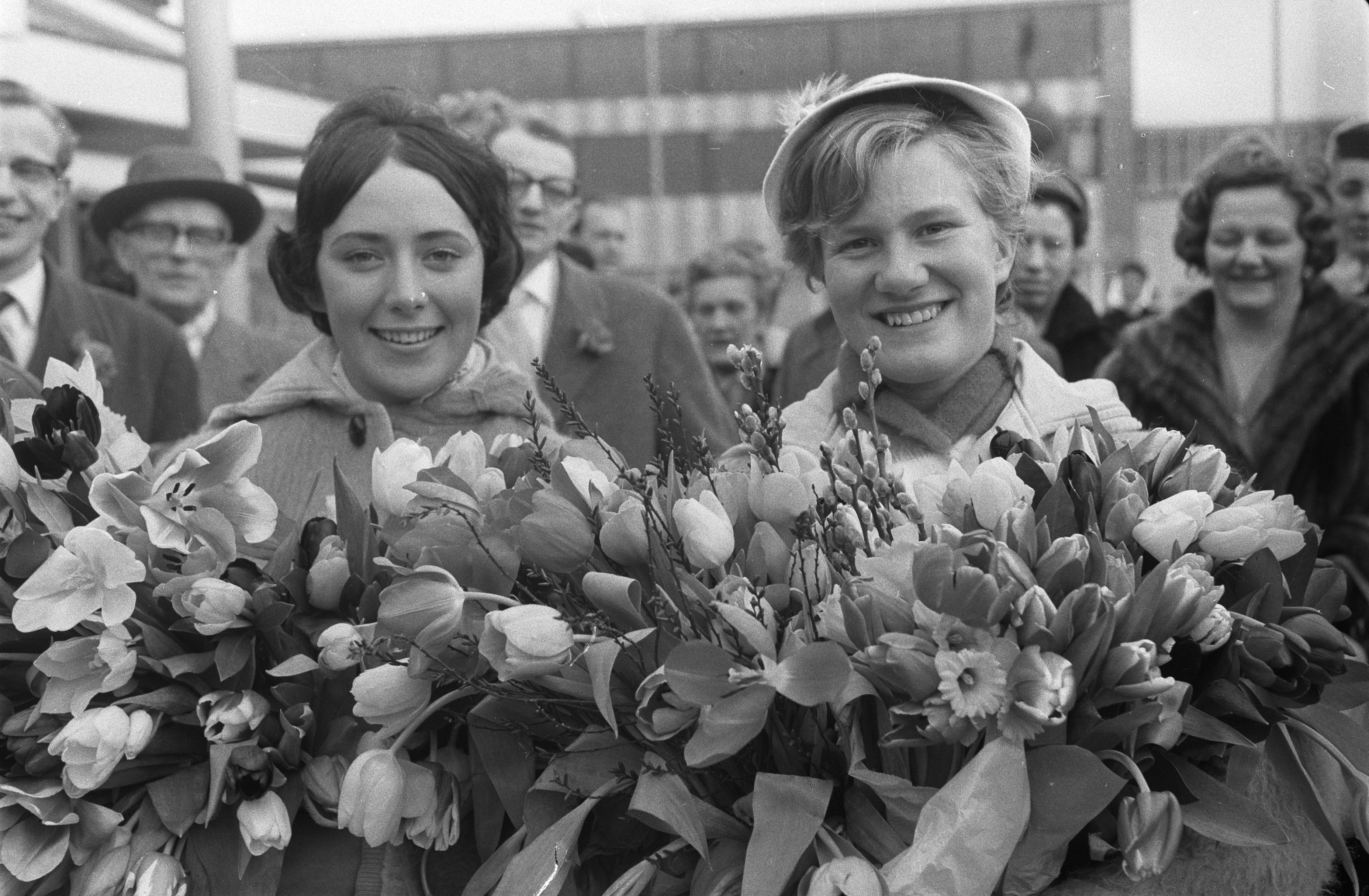 Collectie / Archief : Fotocollectie Anefo Reportage / Serie : [ onbekend ] Beschrijving : Aankomst Sjoukje Dijkstra en Joan Haanappel op Schiphol Sjoukje Dijkstra en Joan Haanappel te midden van de bloemen Datum : 9 maart 1960 Locatie : Noord-Holland, Schiphol Trefwoorden : BLOEMEN, aankomsten Persoonsnaam : Dijkstra, Sjoukje, Haanappel, Joan Fotograaf : Pot, Harry / Anefo Auteursrechthebbende : Nationaal Archief Materiaalsoort : Negatief (zwart/wit) Nummer archiefinventaris : bekijk toegang 2.24.01.05 Bestanddeelnummer : 911-0832